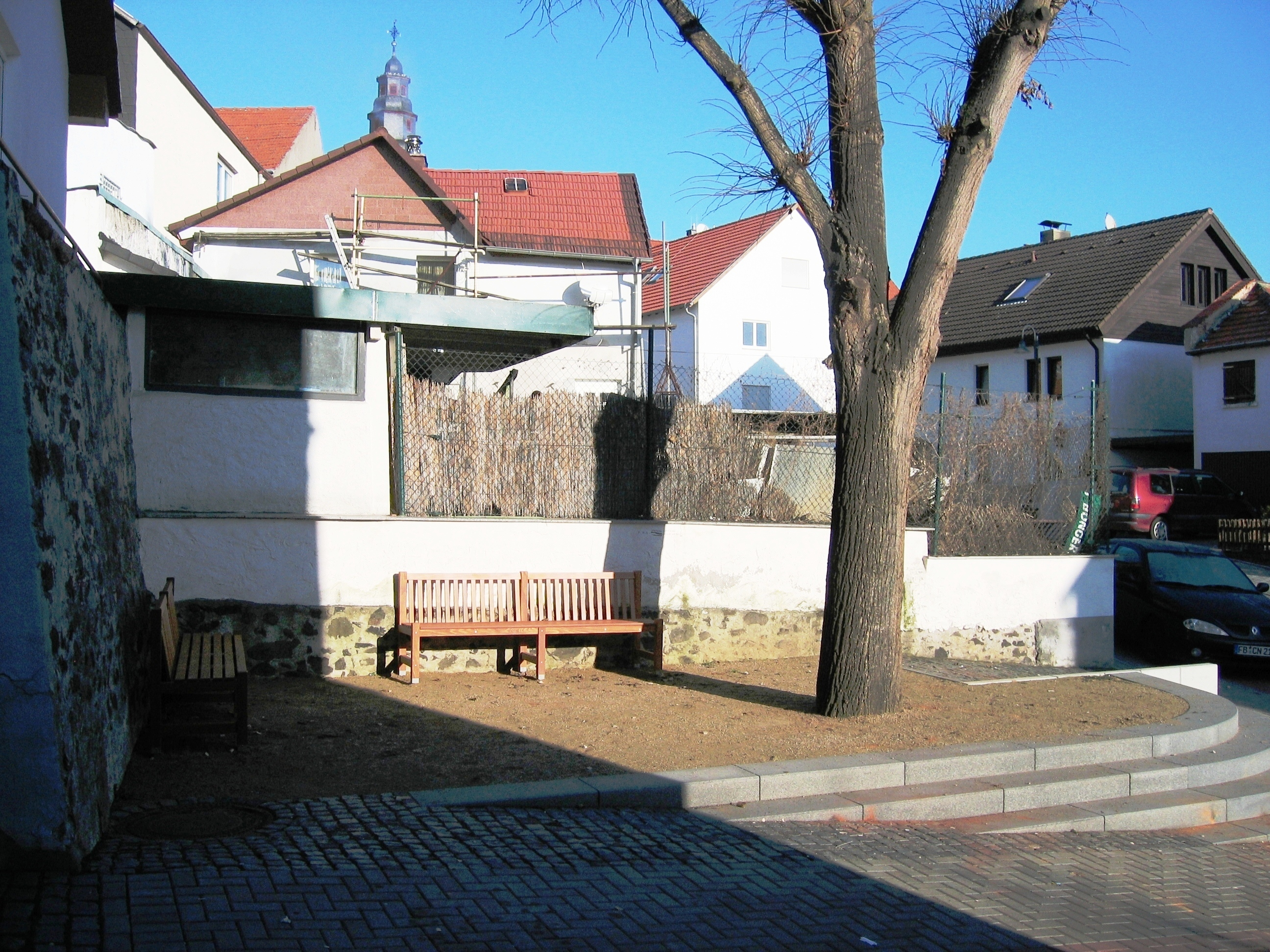 neu gestalteter Platz neben dem Schwarzen Turm in Wölfersheim, an dem die Antoniuskapelle gestanden hatte. Ganz links: Reste der Stadtmauer von Wölfersheim, oben, fast links: Kirchturm der ev.-ref. Kirche, Blickrichtung: Norden, hinter dem Fotografen befindet sich der Schwarze Turm.